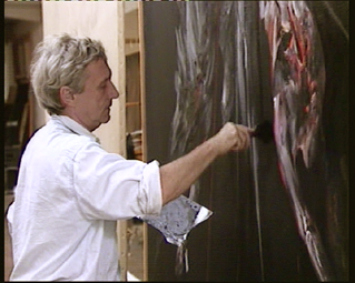 Portrait de Vladimir Velickovic